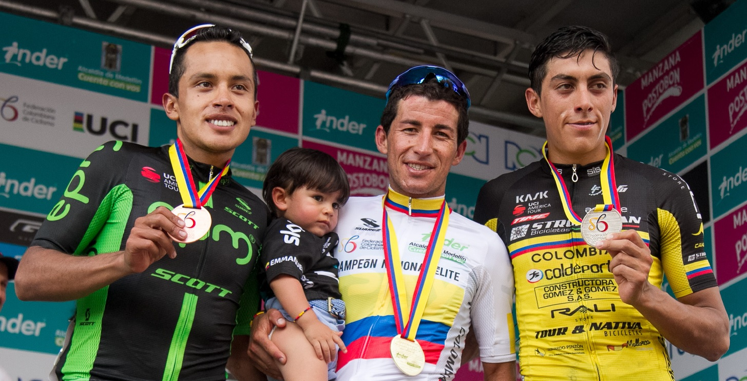 Campeonato Nacional de Ruta Colombia 2018 Ganadores Elite Hombres